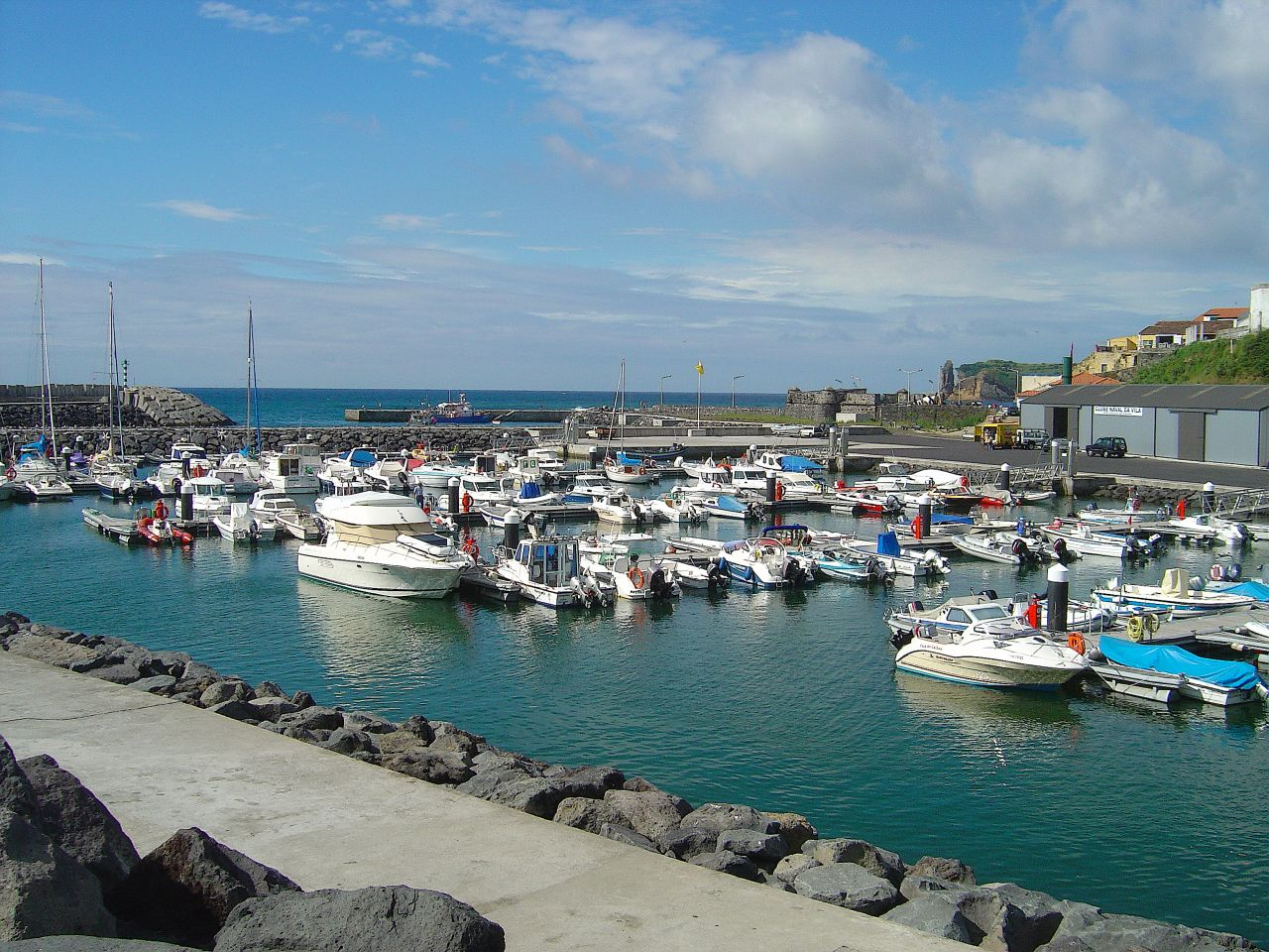 Marina de Vila Franca do Campo - Portugal